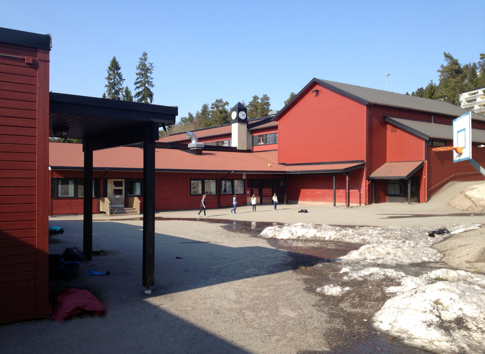 Grindbakken skole i Oslo